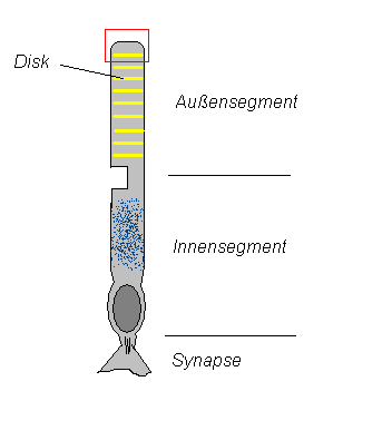 Schmeatische Zeichnung eines Photorezeptors